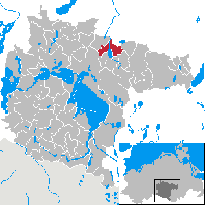 Groß Gievitz in Mecklenburg-Western Pomerania - District Müritz